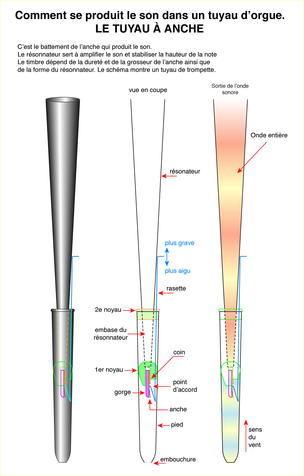 Description Schéma d'un tuyau de jeu d'anche (exemple pris sur le tuyau de trompette d'orgue) Date20 September 2006SourceDessin original effectué sur Adobe IllustratorAuthorMarc GiaconePermission (Reusing this file) Versé au domaine public Schéma d'un tuyau de jeu d'anche (exemple pris sur le tuyau de trompette d'orgue)